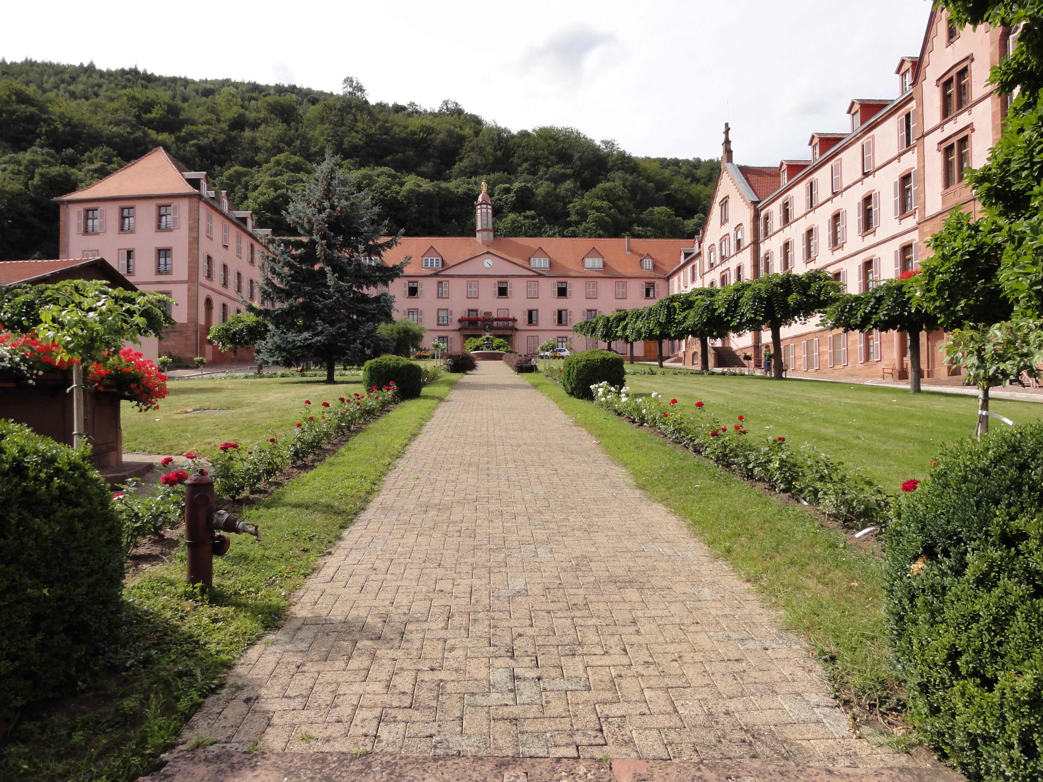 Alsace, Bas-Rhin, Oberbronn, Couvent des Sœurs du Très Saint-Sauveur (IA67005296).